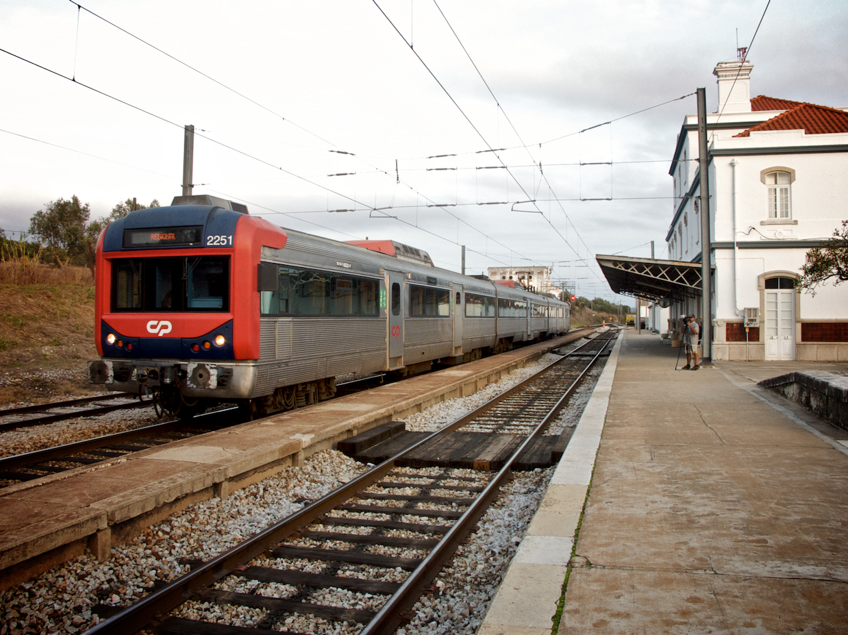 Tipo: Comboio Regional 3702 [Faro - Pinhal Novo] Local: Estação de Alcácer do Sal [Linha do Sul, PK 78] Data e hora: 21 de Outubro de 2008 [18h29] Material: Automotora 2251 [Unidade Tripla Eléctrica]